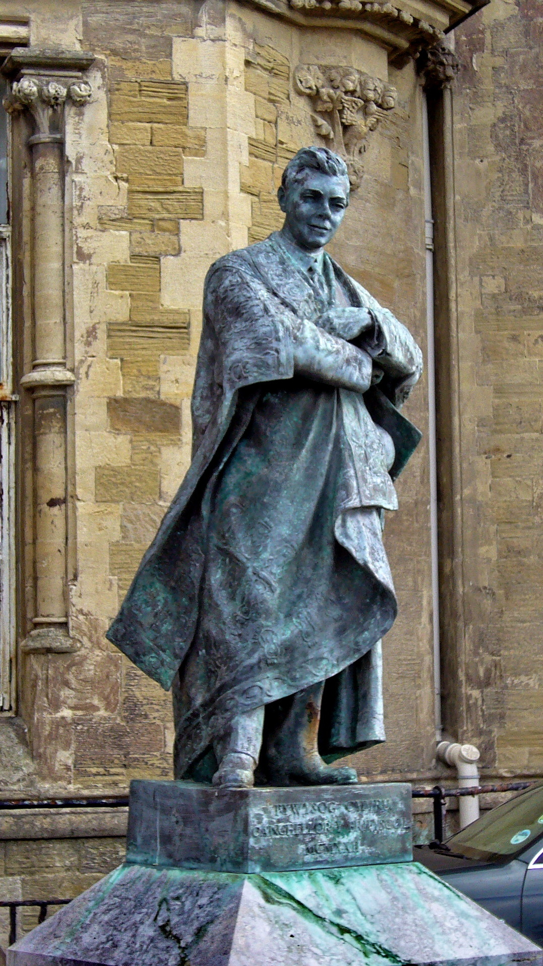 Aberystwyth